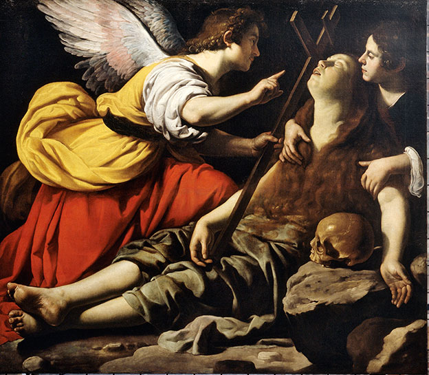 Rutilio Manetti, L'Extase de la Madeleine, vers 1625, huile sur toile, 130 cm x 160 cm, Eglise Saint-Eustache, Paris.